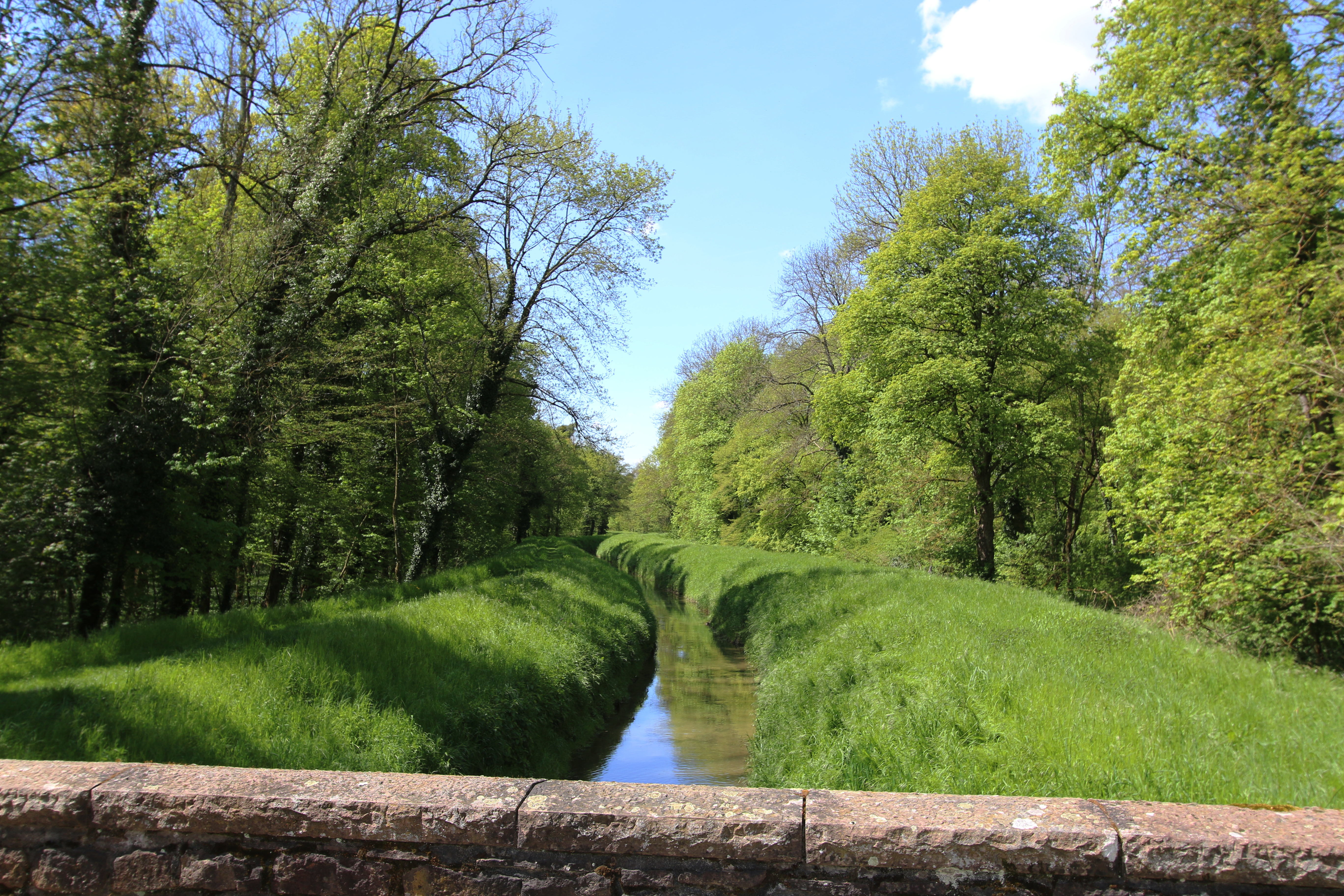 Blick auf den Hardtbach von der Radbrücke, Blickrichtung Norden